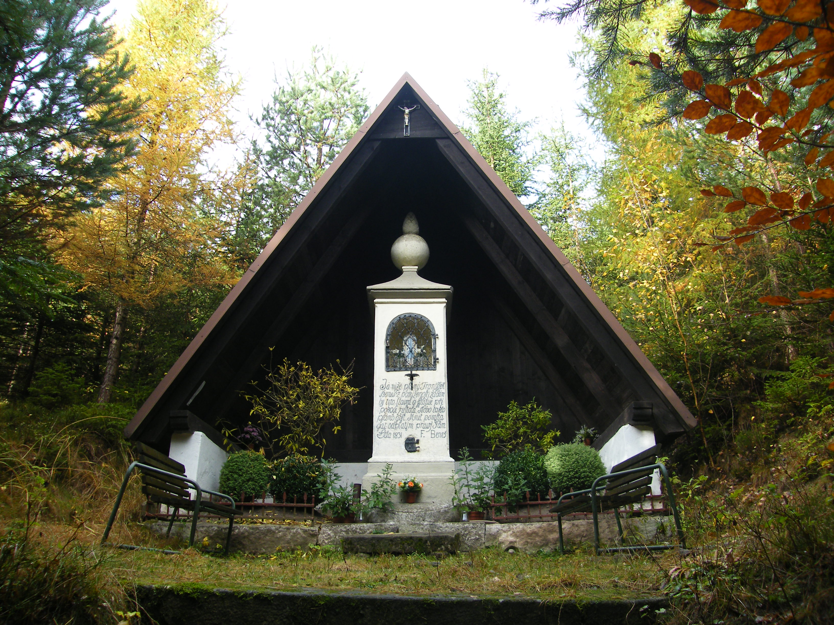 Žďárky - Doly - pomník